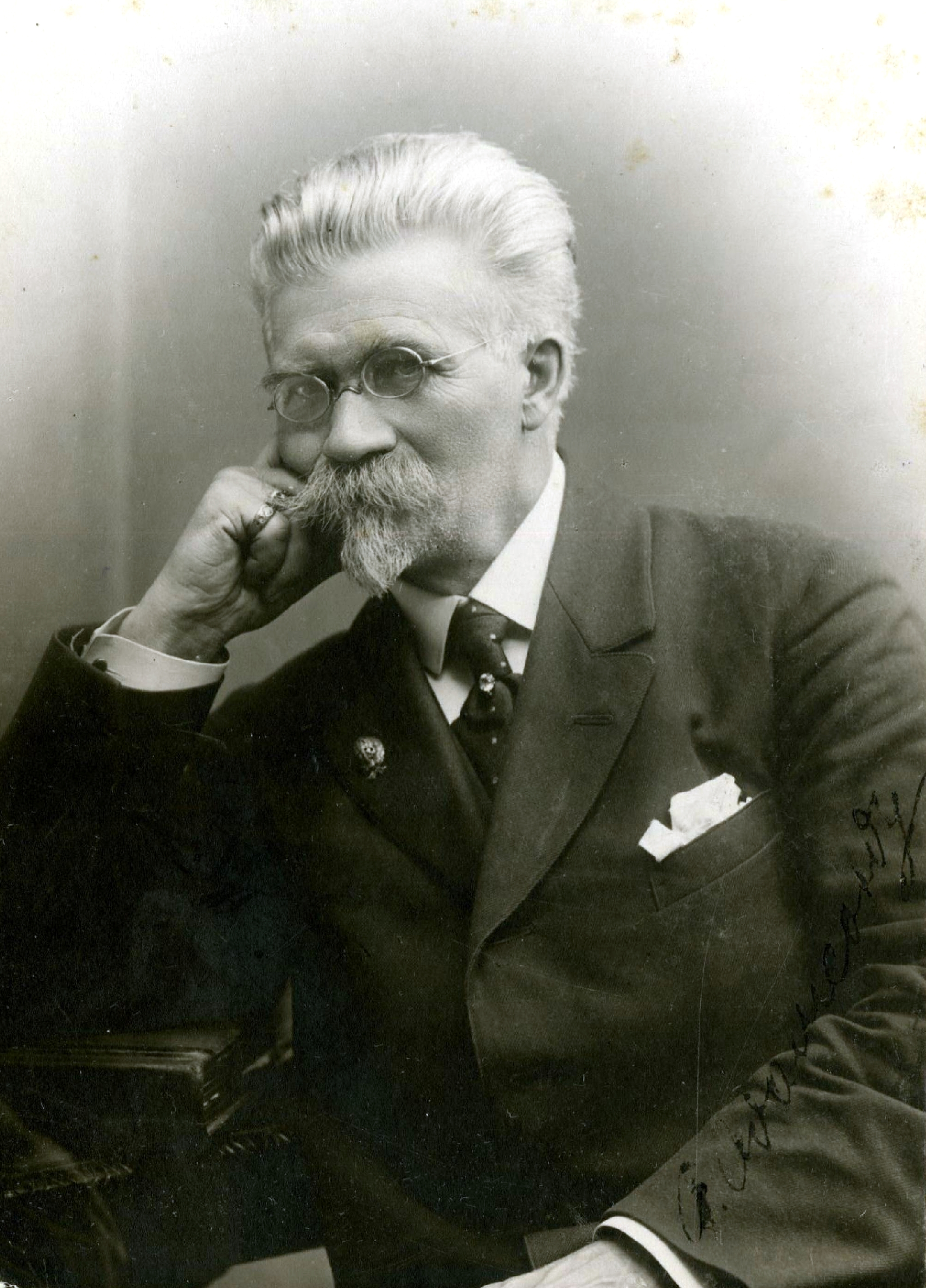 Адамсон, Амандус Хейнрих